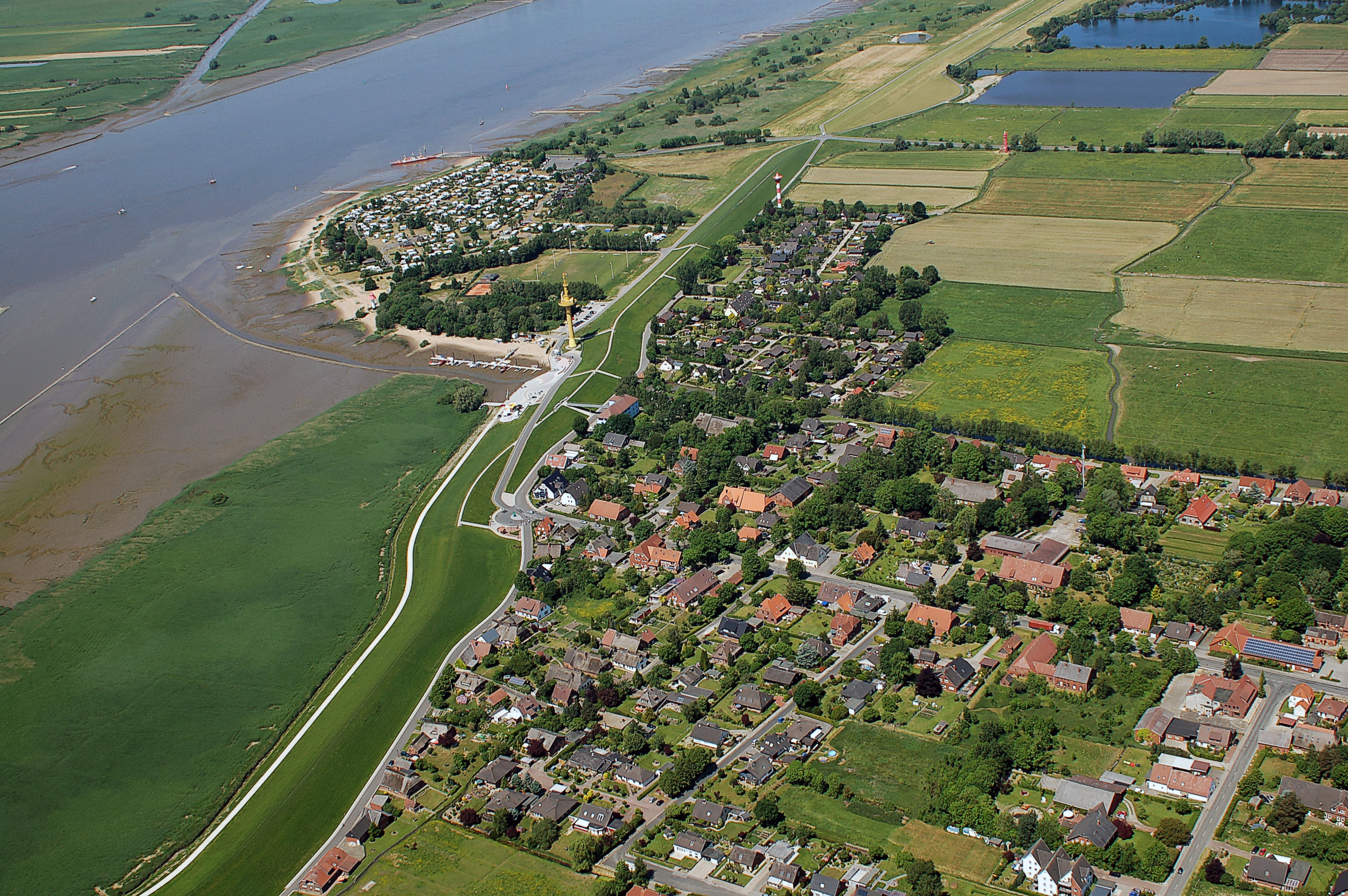 Sandstedt. Luftbilder von der Nordseeküste 2012-05